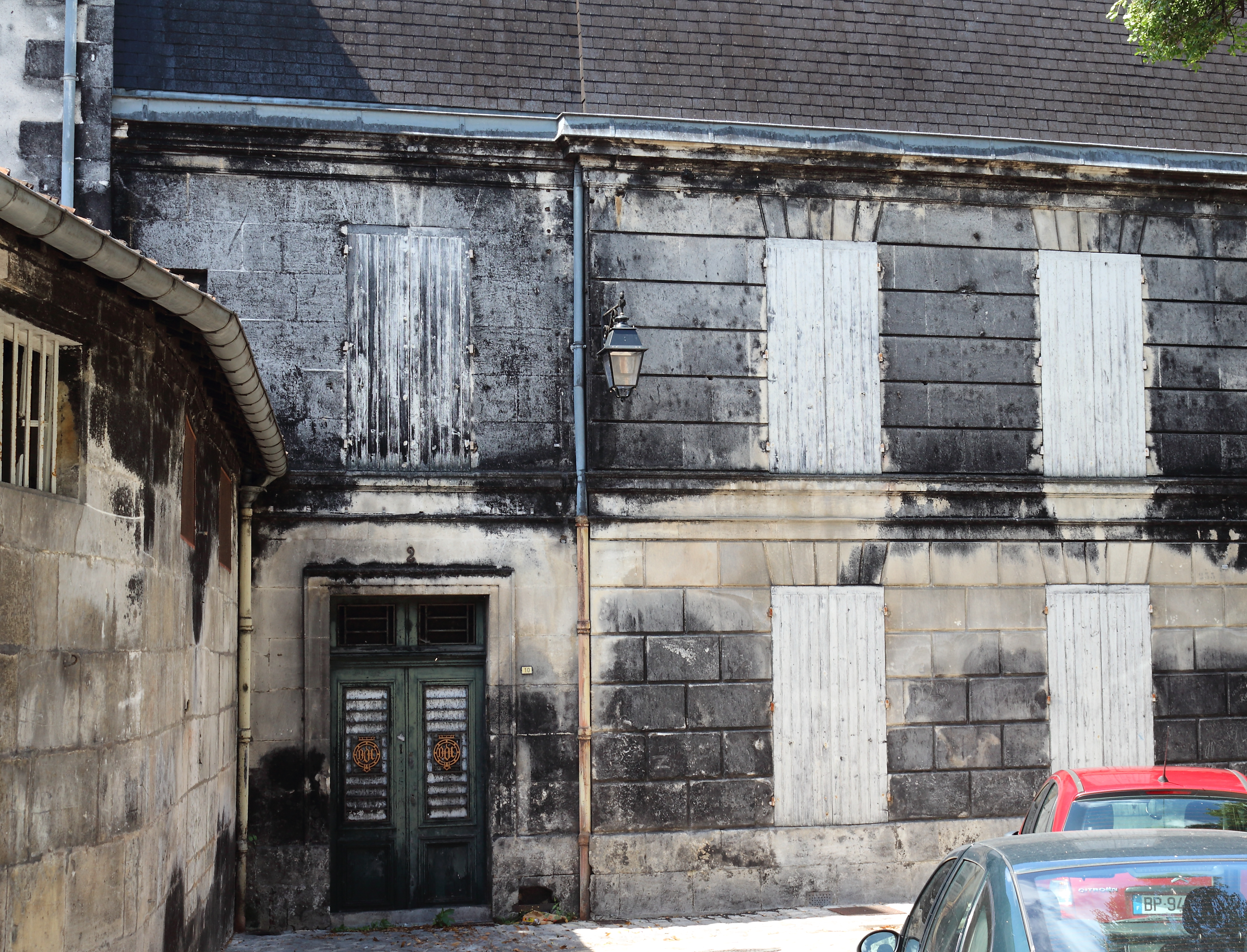 Moisissure noire sur les murs des chais d'Otard à Cognac (Charente, Poitou-Charentes, France). Le phénomène est du au développement du champignon Baudoinia compniacencis sur les matériaux imbibés de vapeur d'alcool (« part des anges »).